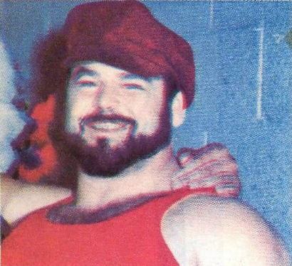 Ivan Putski en couverture du programme de catch de la World Wide Wrestling Federation en 1977